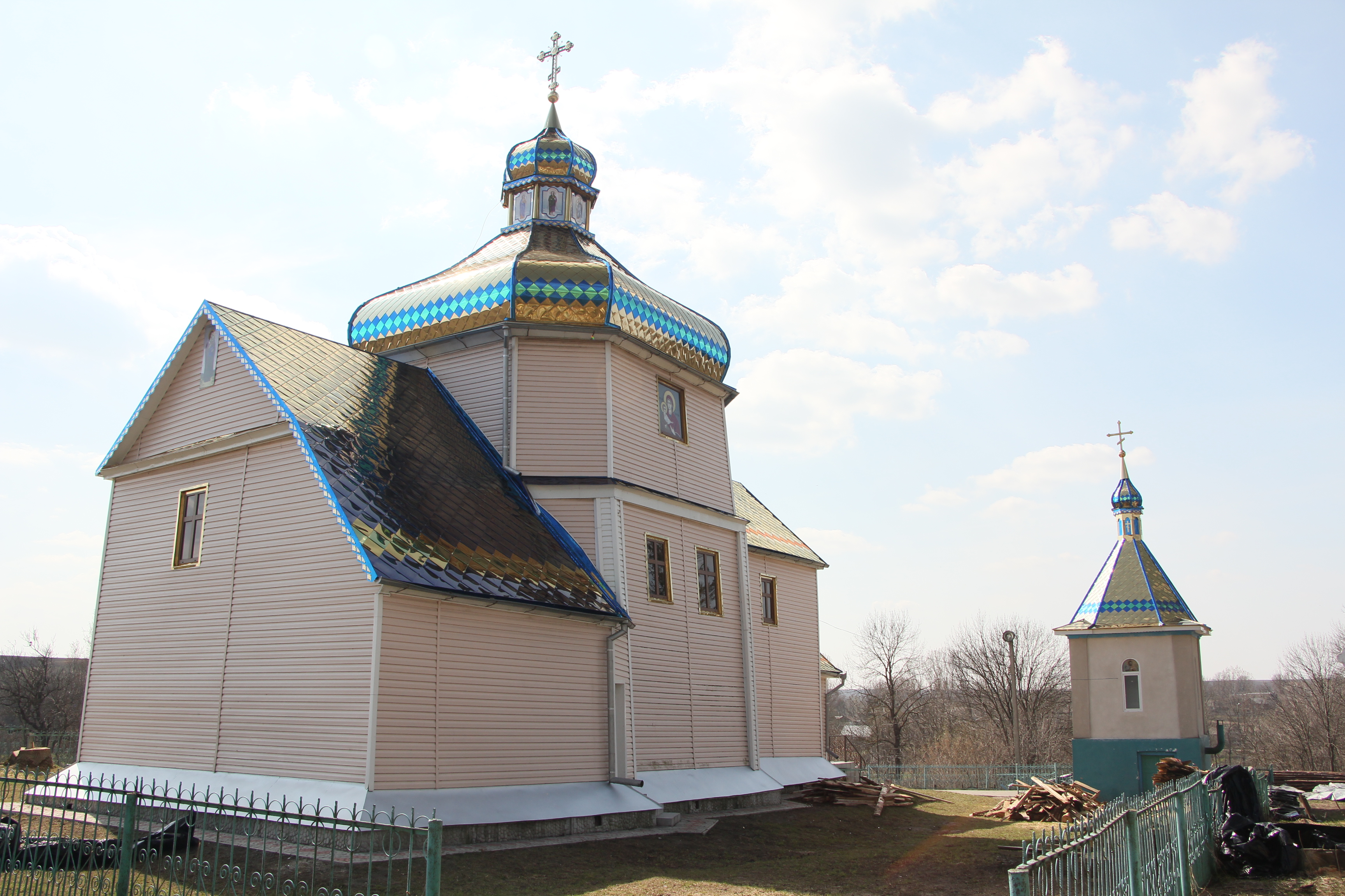 Дерев'яна церква в селі Синівці Лановецького району, Тернопільскої області